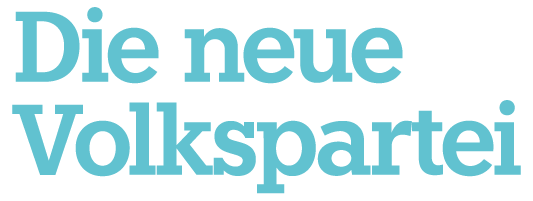 Logo der VP